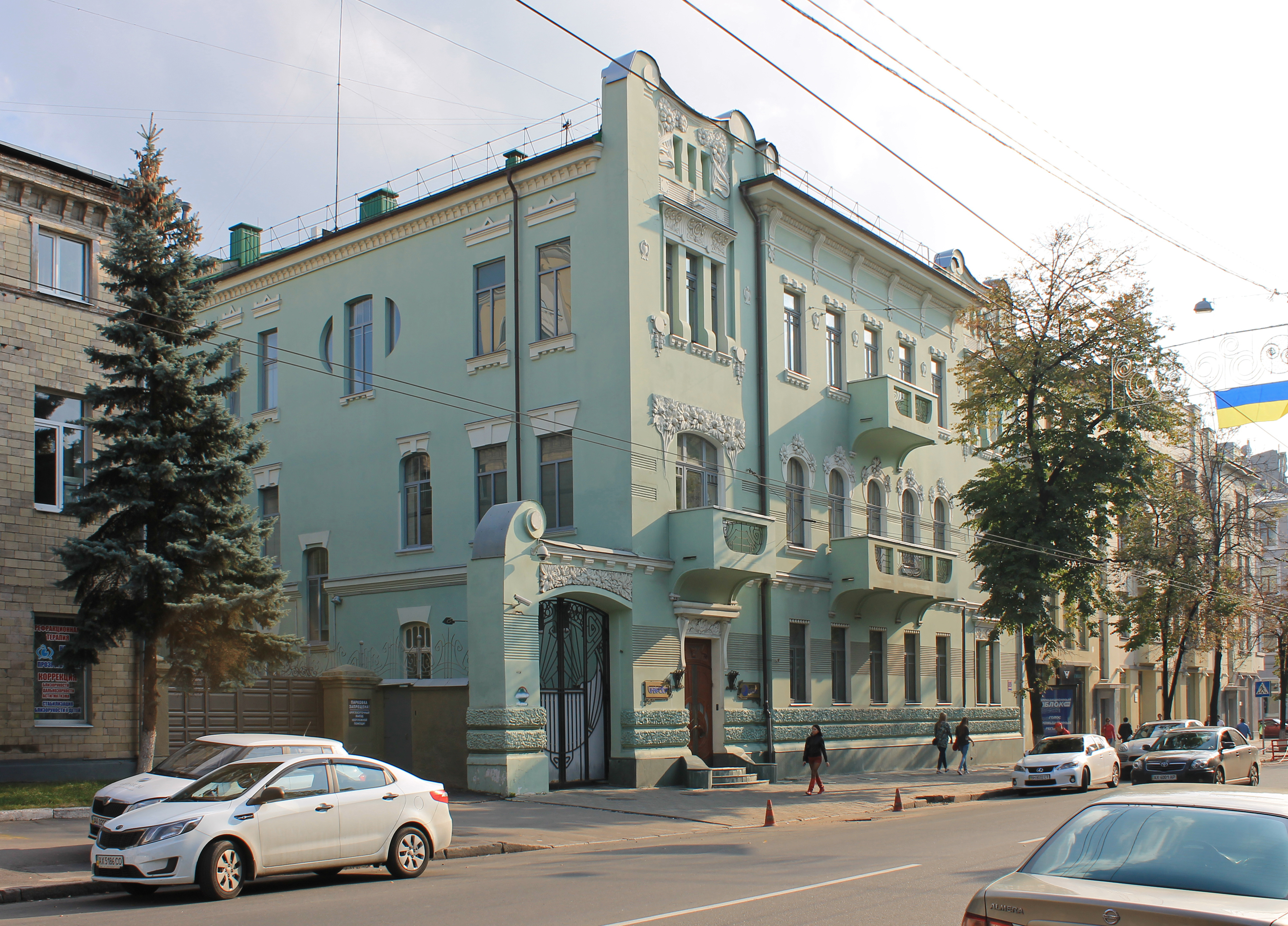 Колишній житловий будинок 1914р. (зараз банківська установа), архітектор М.Г.Диканський, вул.Сумська,88, м.Харків.